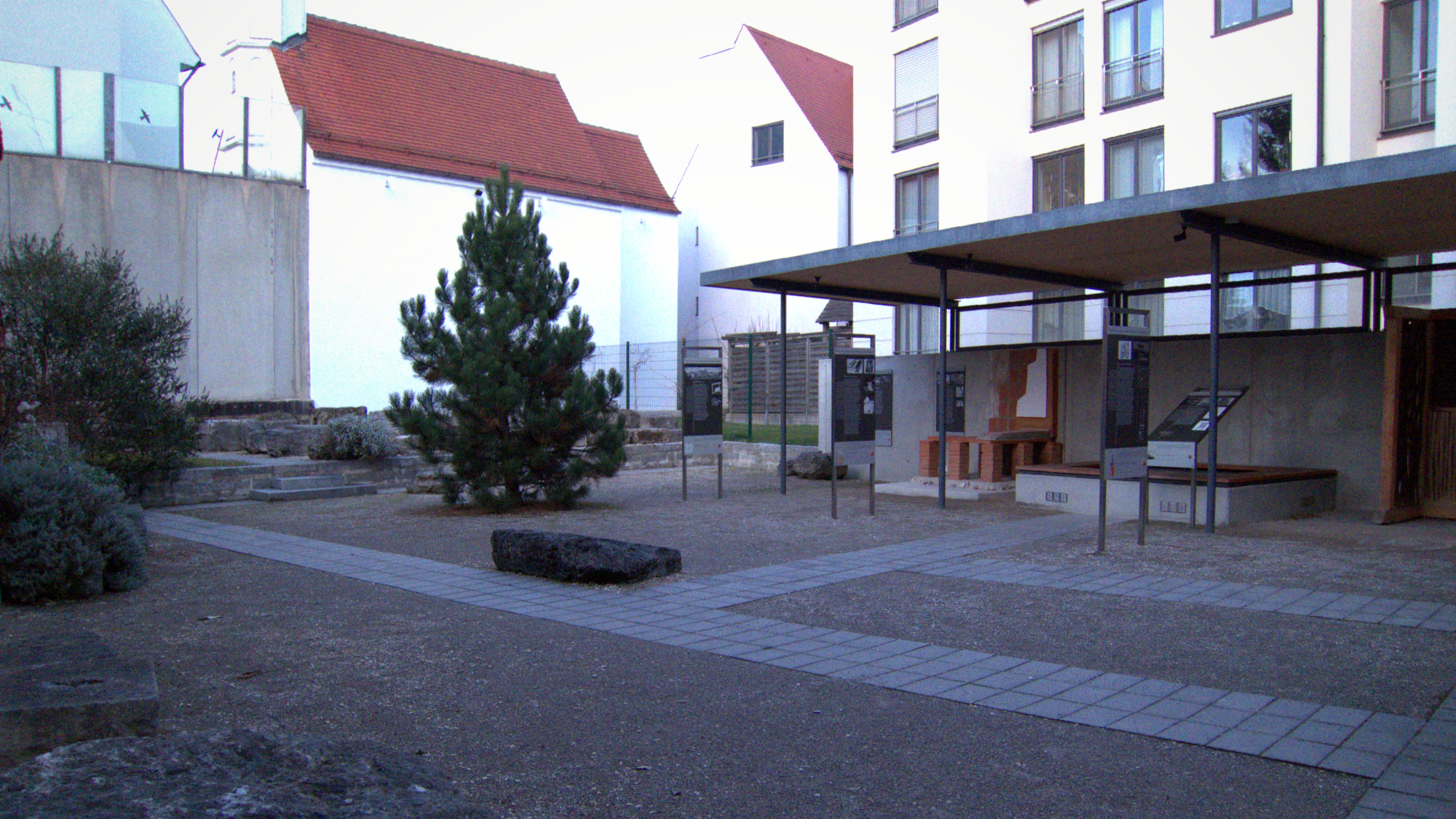 Teil des Archäologischen Gartens in Augsburg, Äußeres Pfaffengäßchen. Aufnahme aus SüdWest